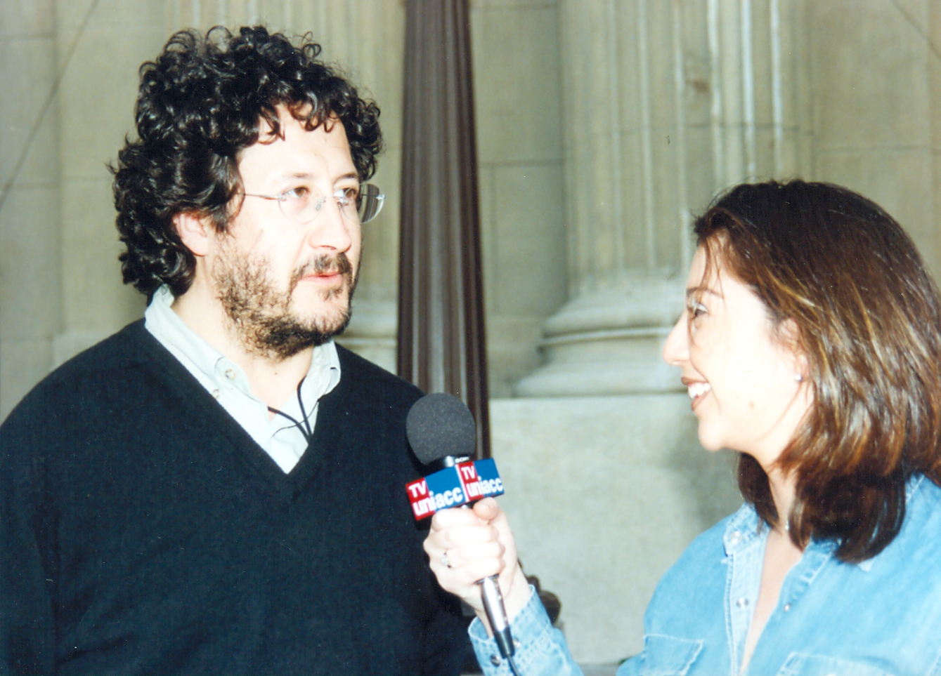 Actor Willy Semler; Invitado especial; año 2001